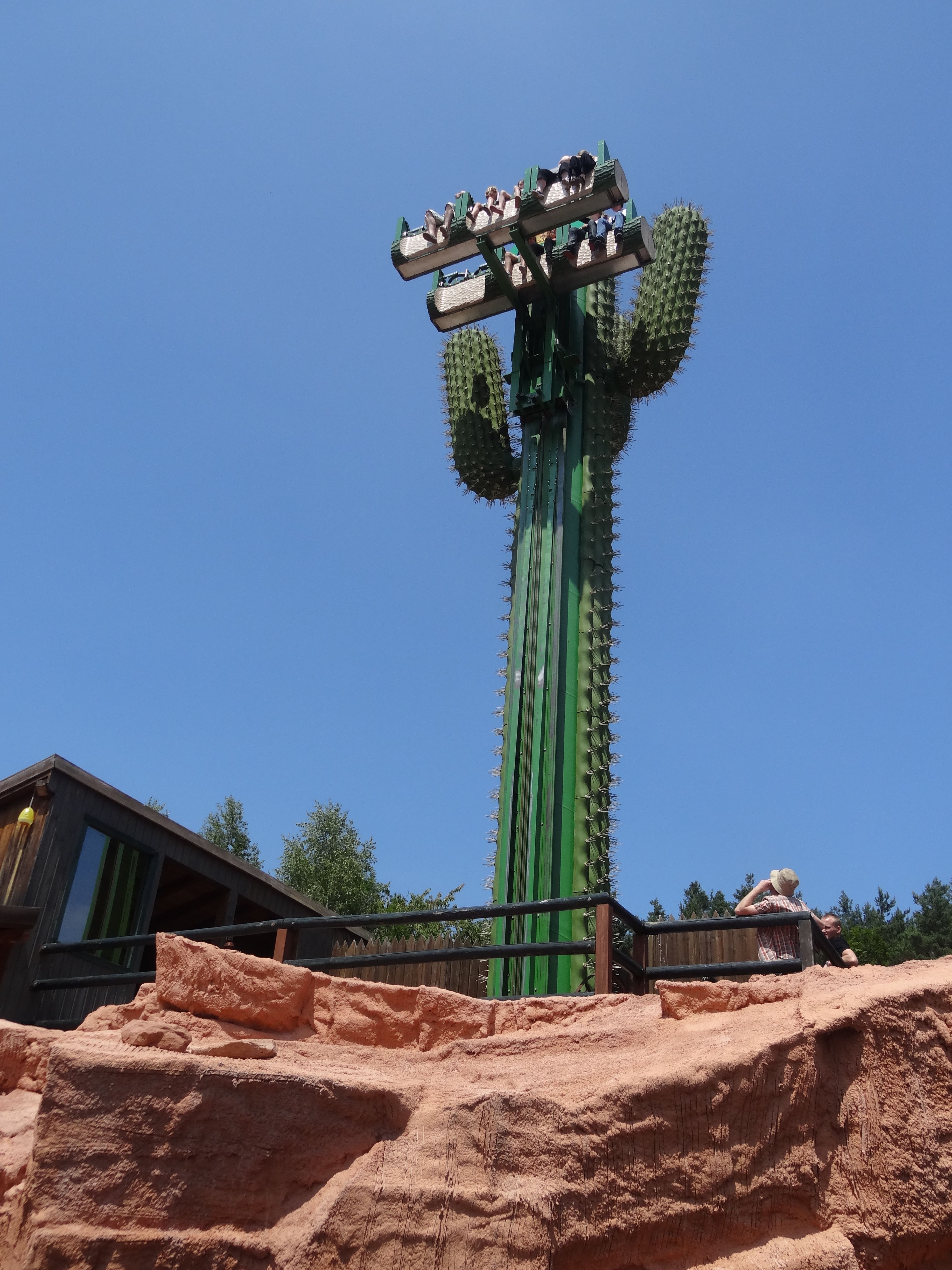 Le Cactus à Fraipsertuis City